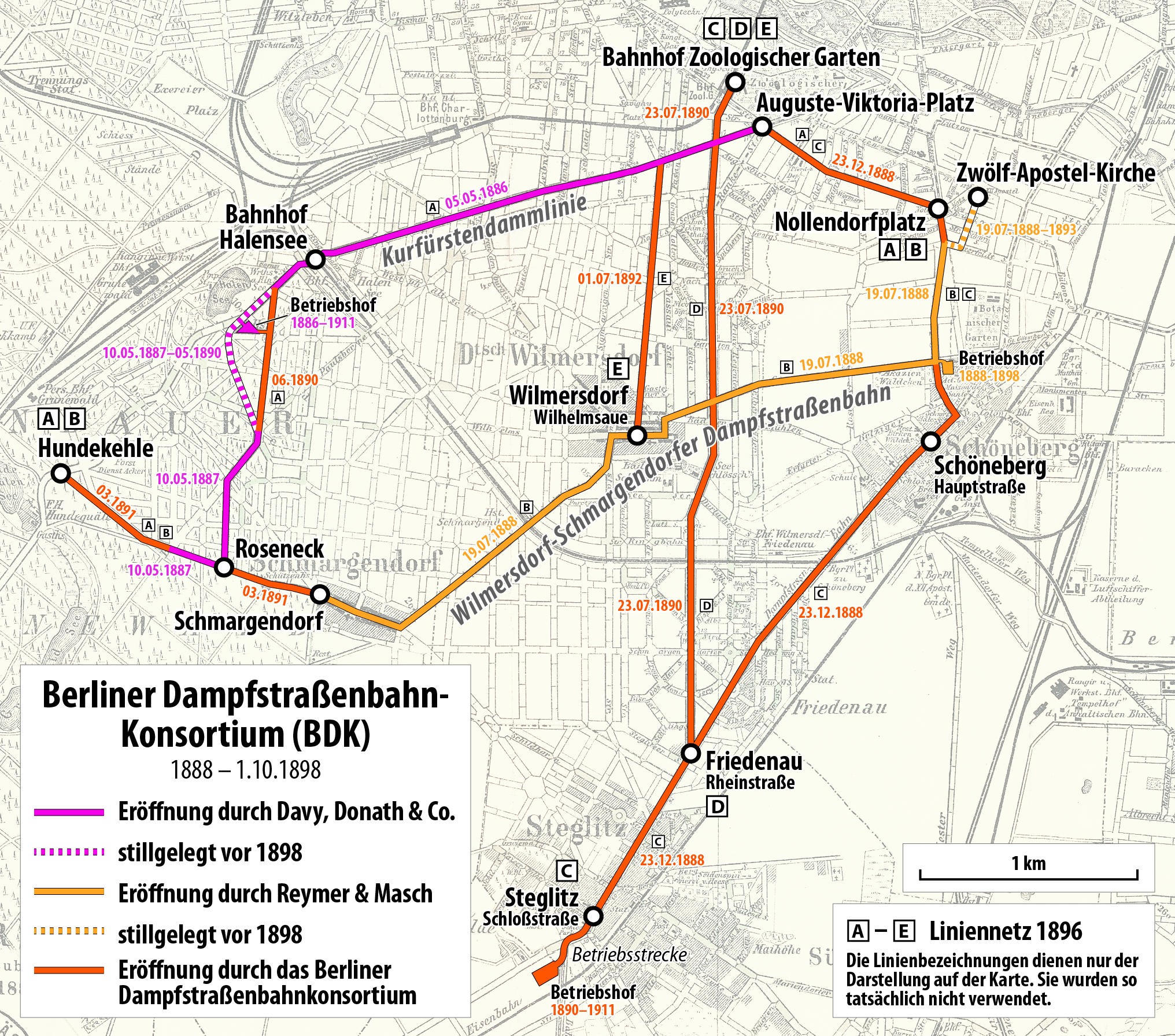 Karte des Streckennetzes des Berliner Dampfstraßenbahn-Konsortiums (1888–1.10.1898)